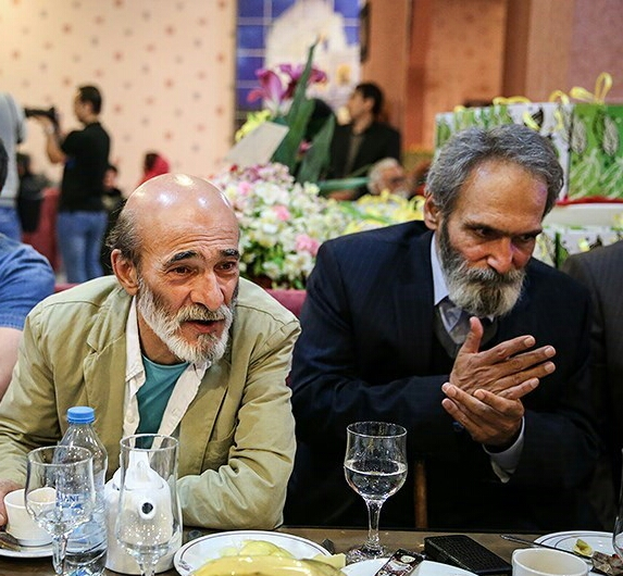 جهانگیر الماسی (راست) - ضیاءالدین دری (چپ)